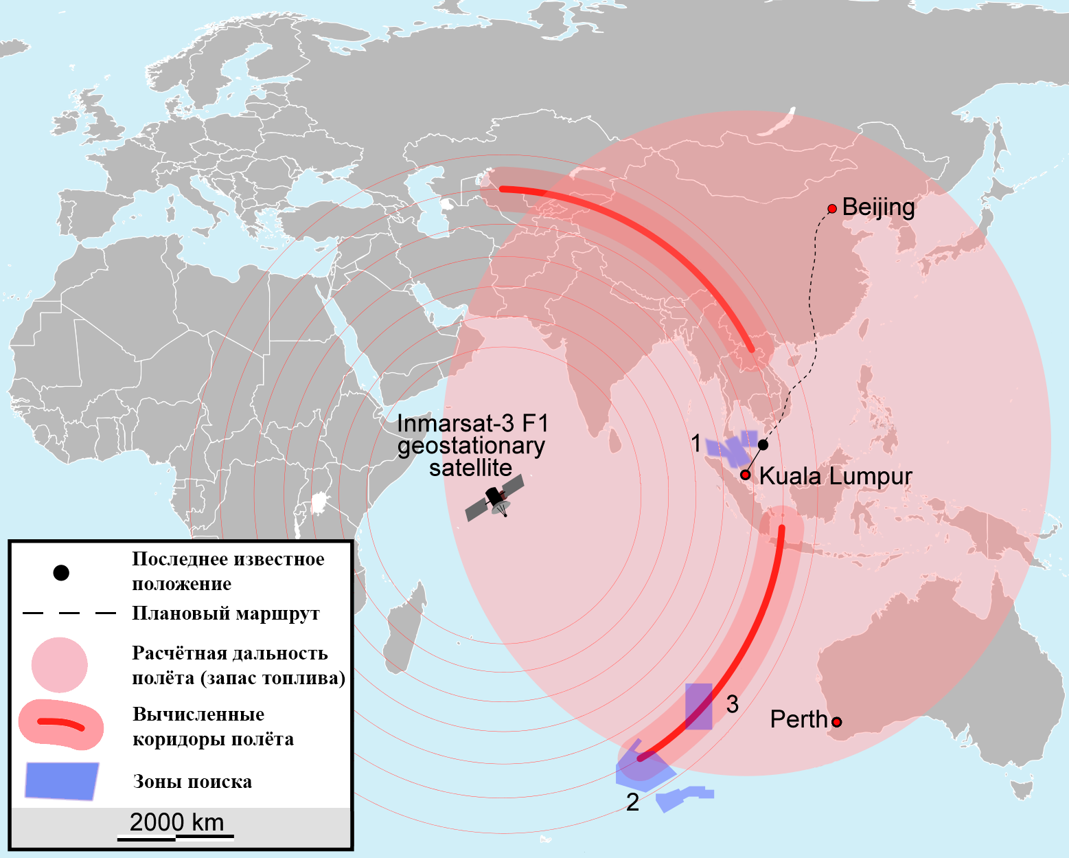 Переведены некоторые фразы на русский язык из файла